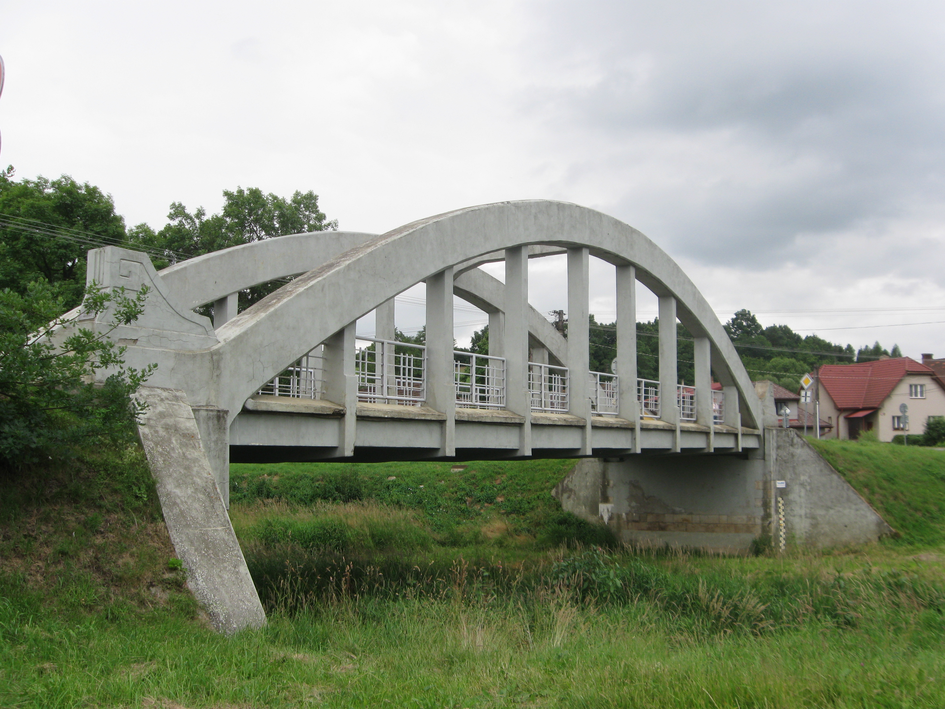 obloukový železobetonový most přes řeku Trnavu z roku 1912, projekt Ing. Stanislav Bechyně